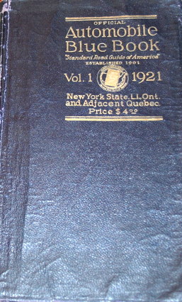 Automobile Blue Book